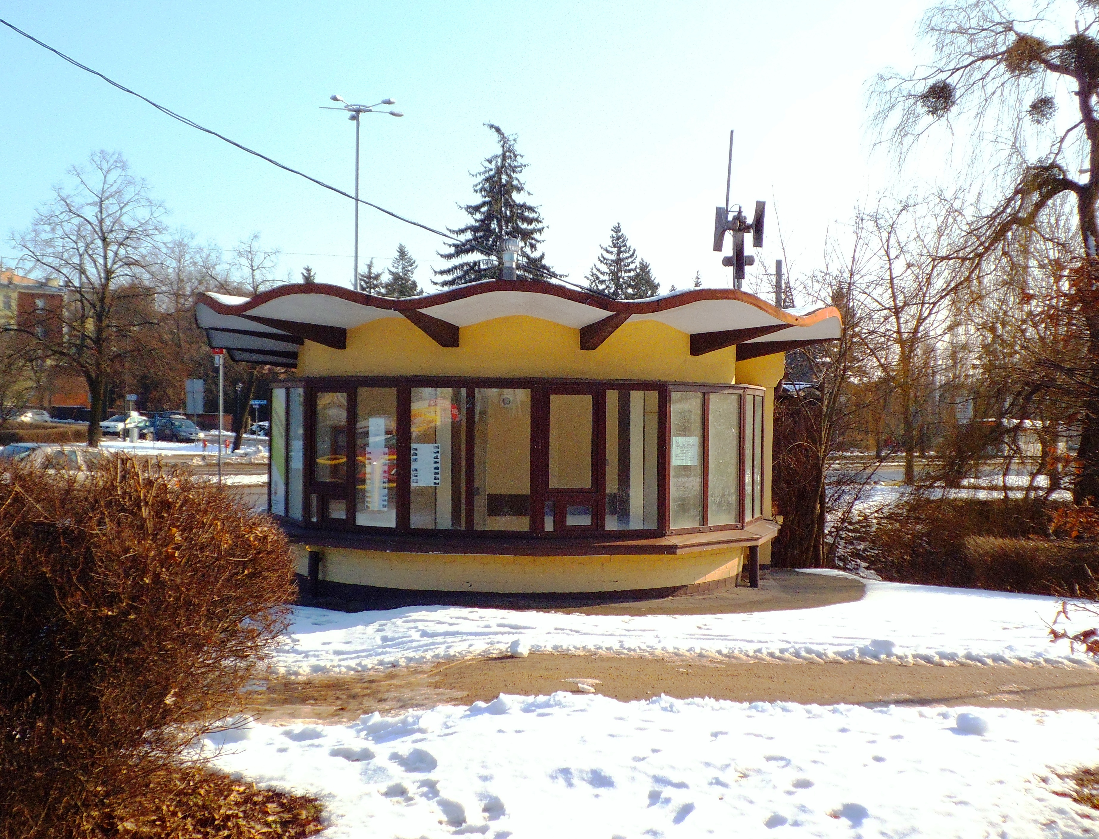 Pawilon MZK w Toruniu